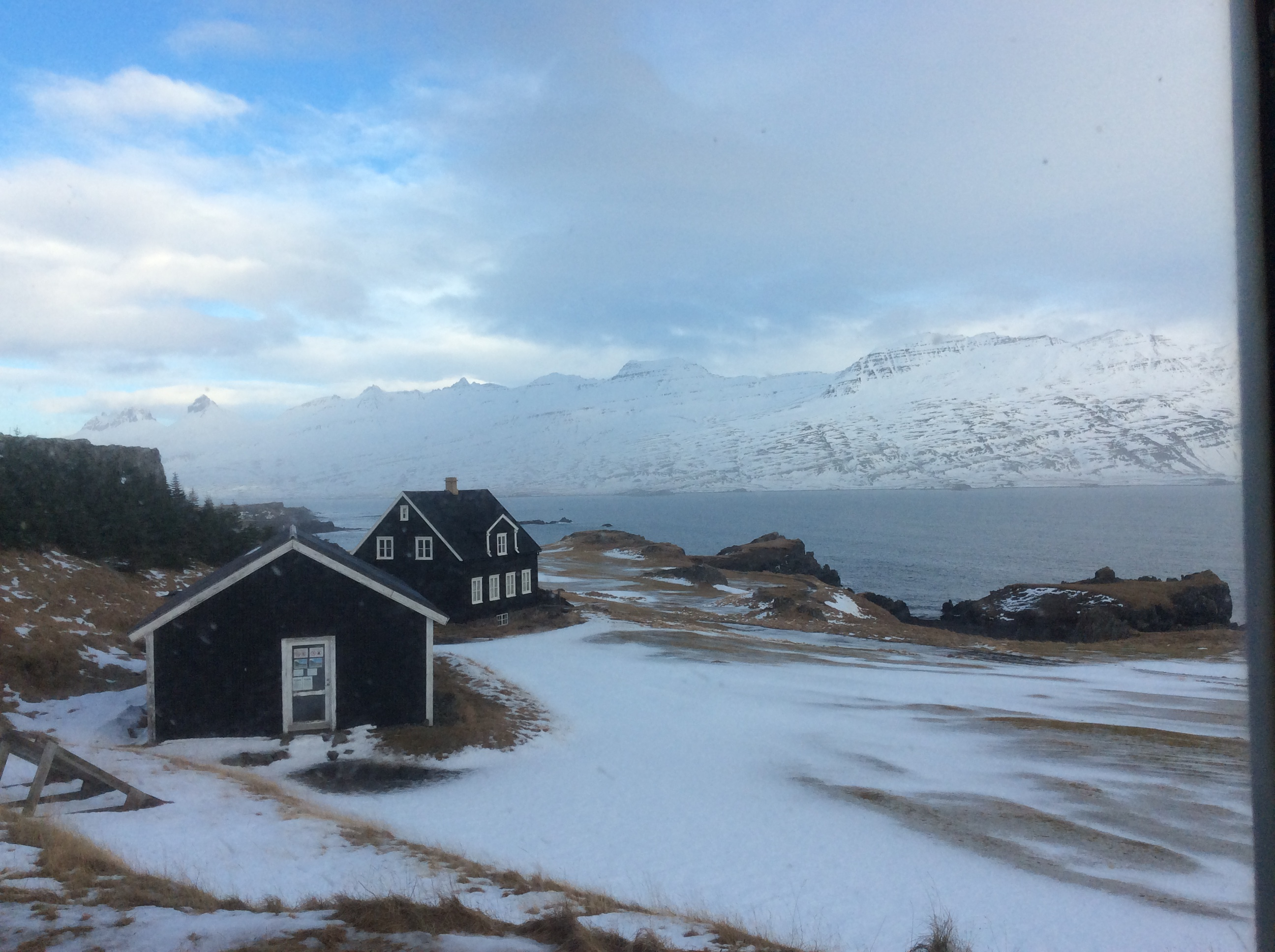 Wayvadts hús og geislasteinasafnið